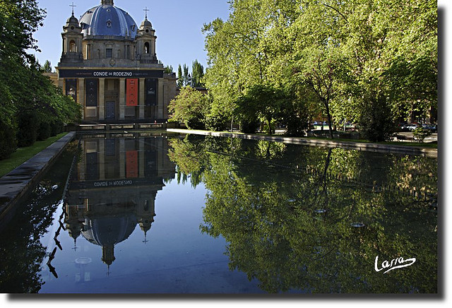 Una plaza emblemática de Pamplona que con la Ley de Memoria Histórica ha ido cambiando de nombre, desde Monumento a los Caídos a Plaza Conde Rodezno y probablemente vuelva ahora a cambiar de nombre. He intentado un HDR pero como no me convencía el resultado debido al alto contraste del amanecer, he vuelto a mi método tradicional de poner tres capas con exposiciones distintas y con las máscaras, sacar de cada una la luz que más me convencía. Saludos a todos. DATOS EXIF: Cámara Pentax K10D. Sigma 18-200. Focal: 63 mm. Apertura: F6,7 Velocidad 1/1000s ISO: 200 Iluminación: Natural. Editor: UFRaw + Gimp.